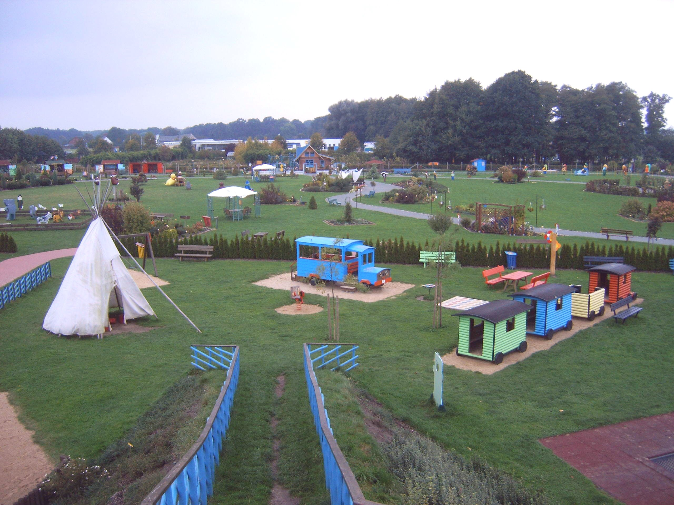 Märchenpark Salzwedel, Sachsen-Anhalt, Deutschland